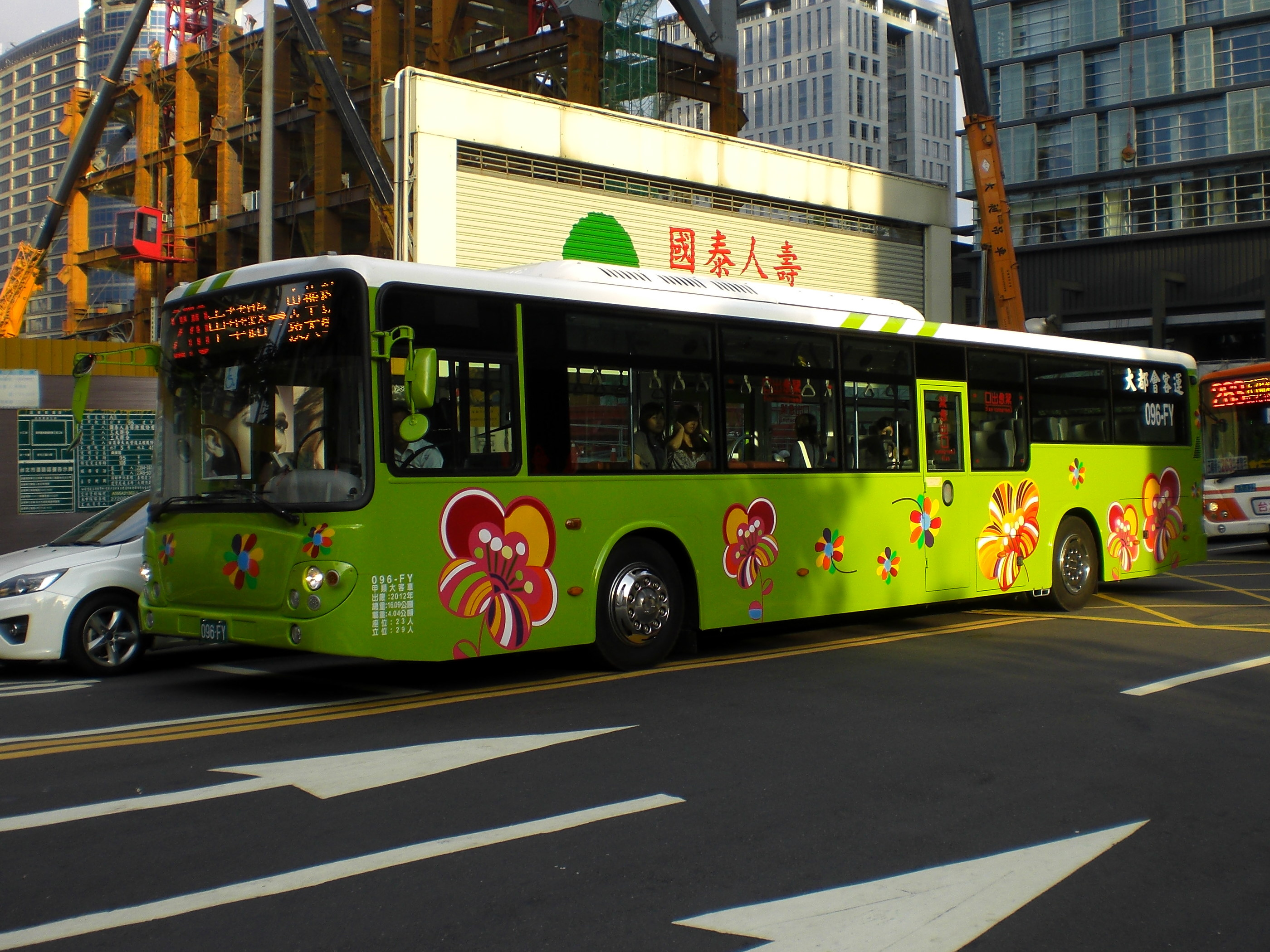 大都會客運的2012年大宇BS120CN-8大客車096-FY左前方外觀。後方為國泰建設「國泰置地廣場」建築工地，工地鐵捲門上繪國泰人壽商標。